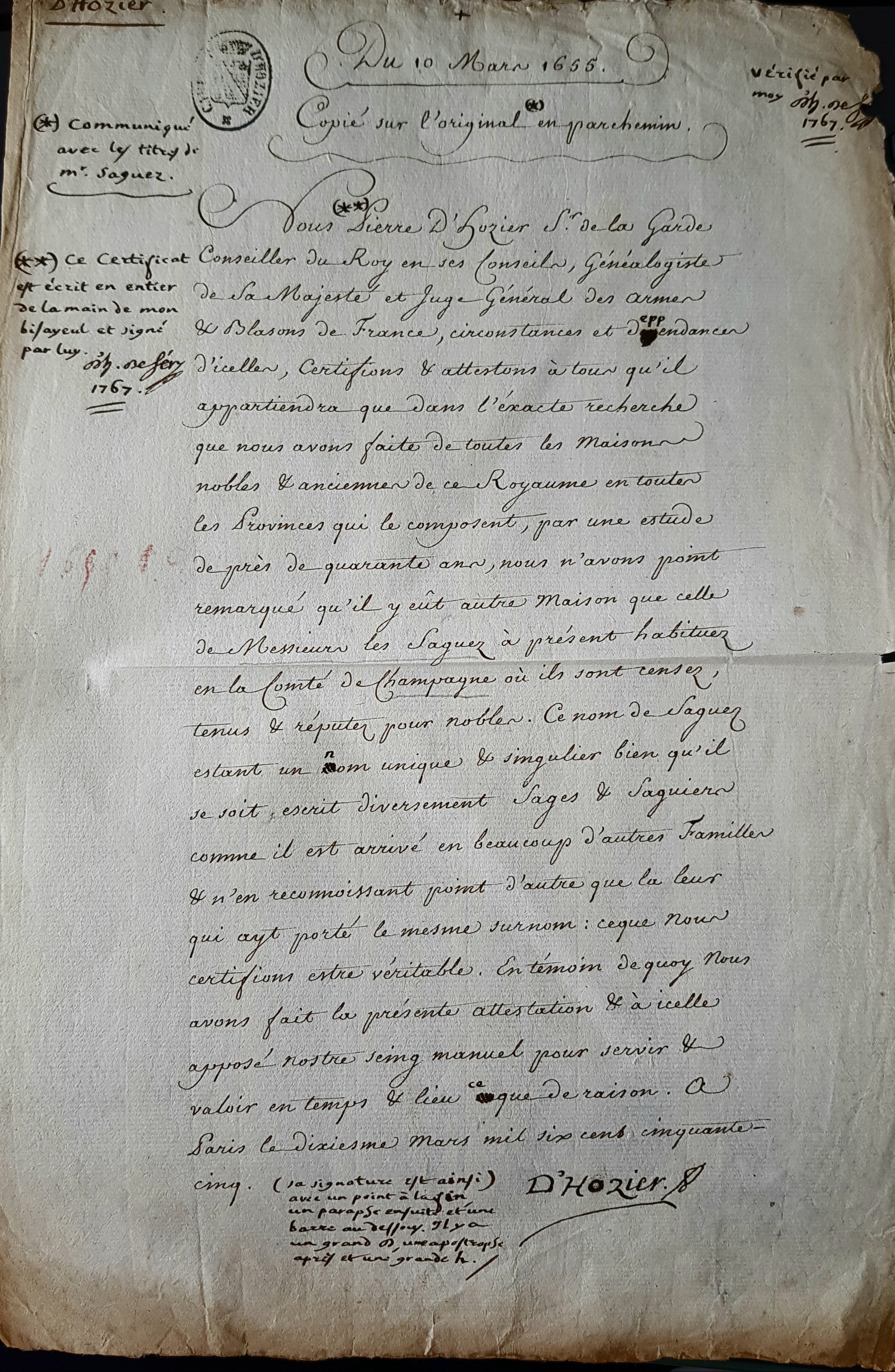 Attestation de Noblesse délivrée par Pierre d'Hozier pour les Saguez